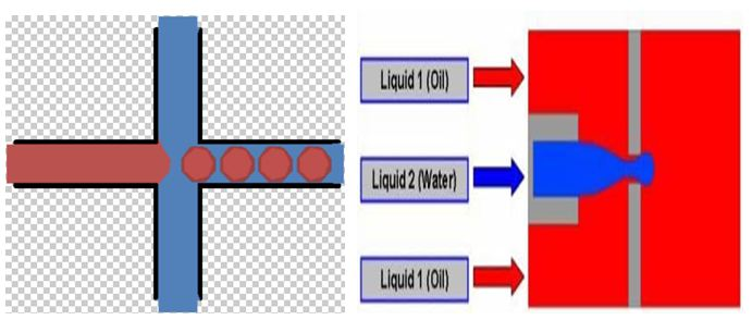 استفاده از هیدرو دینامیک Flow focusing برای تولید قطرۀ آغشته به روغن